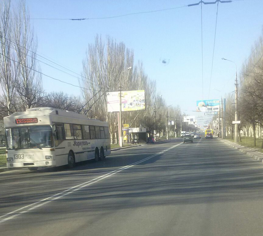 Маріуполь, проспект Будівельників. Тролейбус MAN SL 172 HO (№ 1303) на маршруті № 15